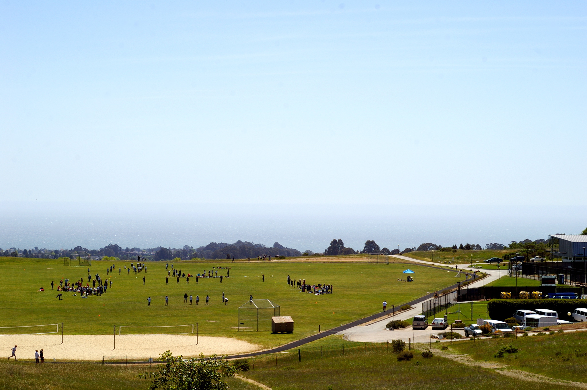 UCSC East Field